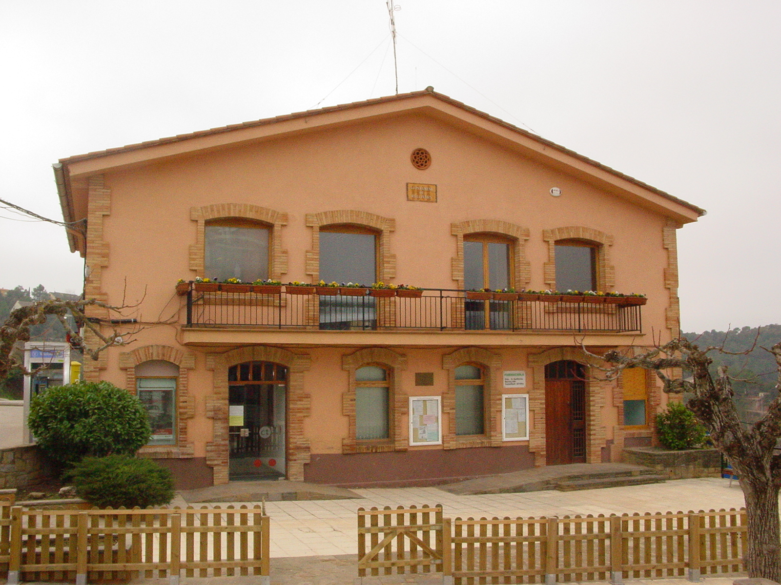 Ajuntament de Rellinars